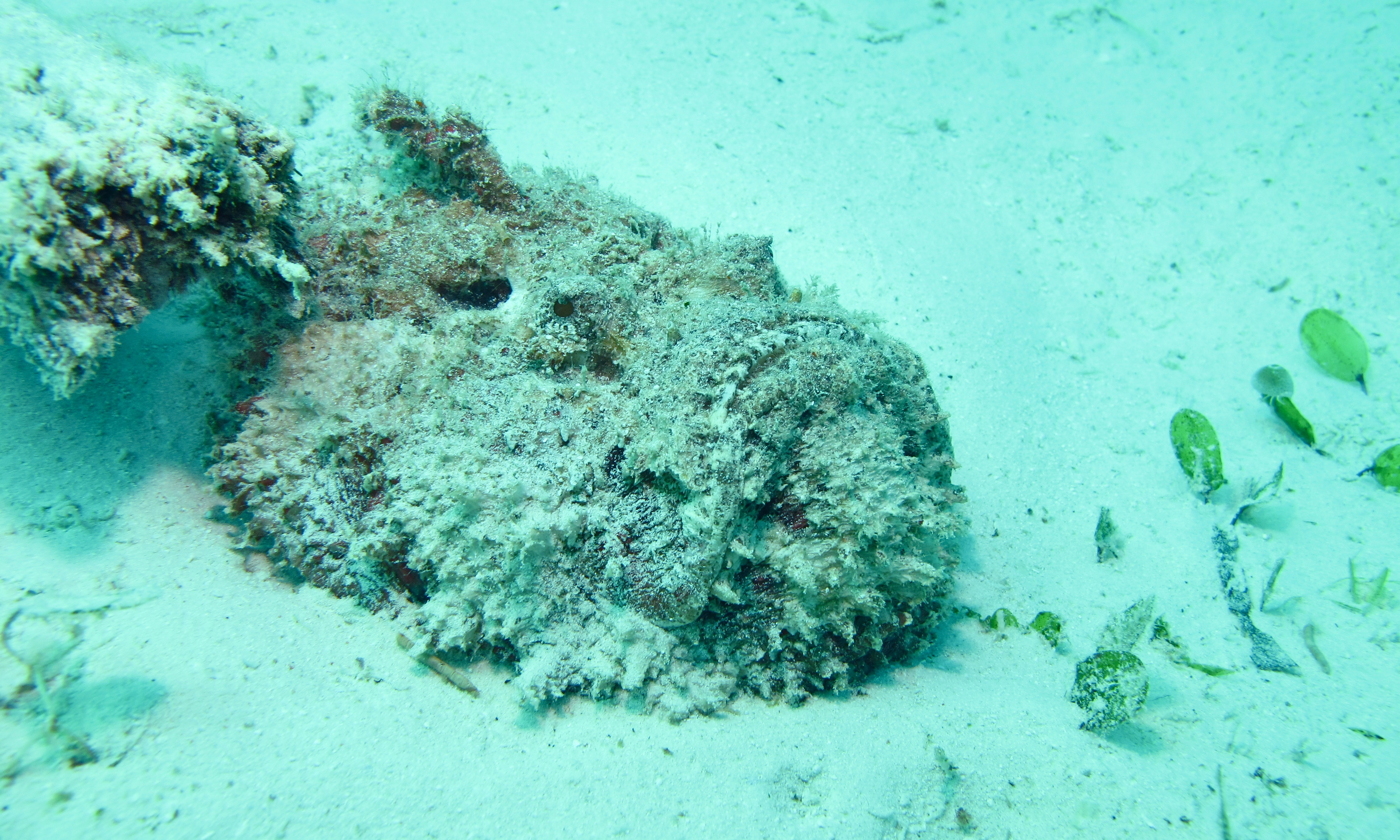 Awas, Pulau Mabul, Sabah, MALAYSIA